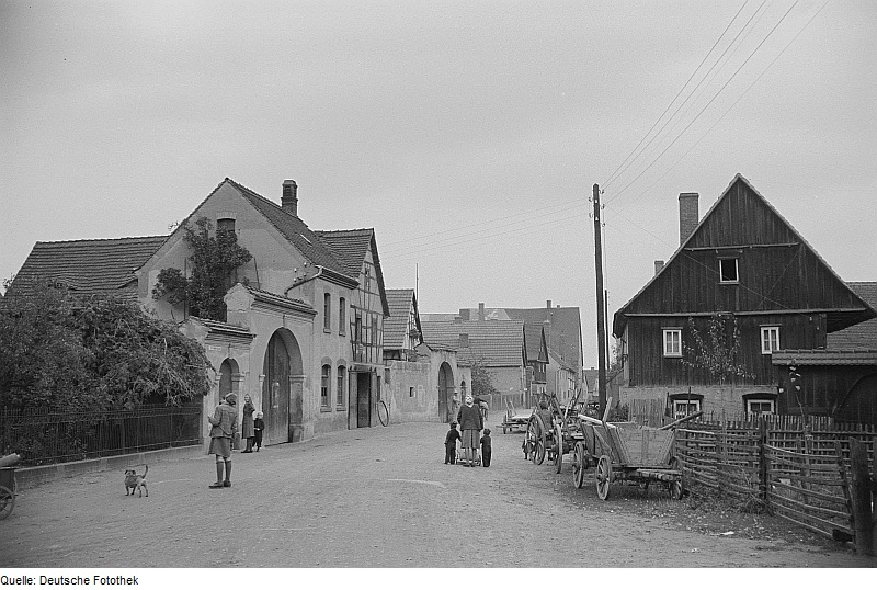 Original image description from the Deutsche Fotothek Ortsansicht